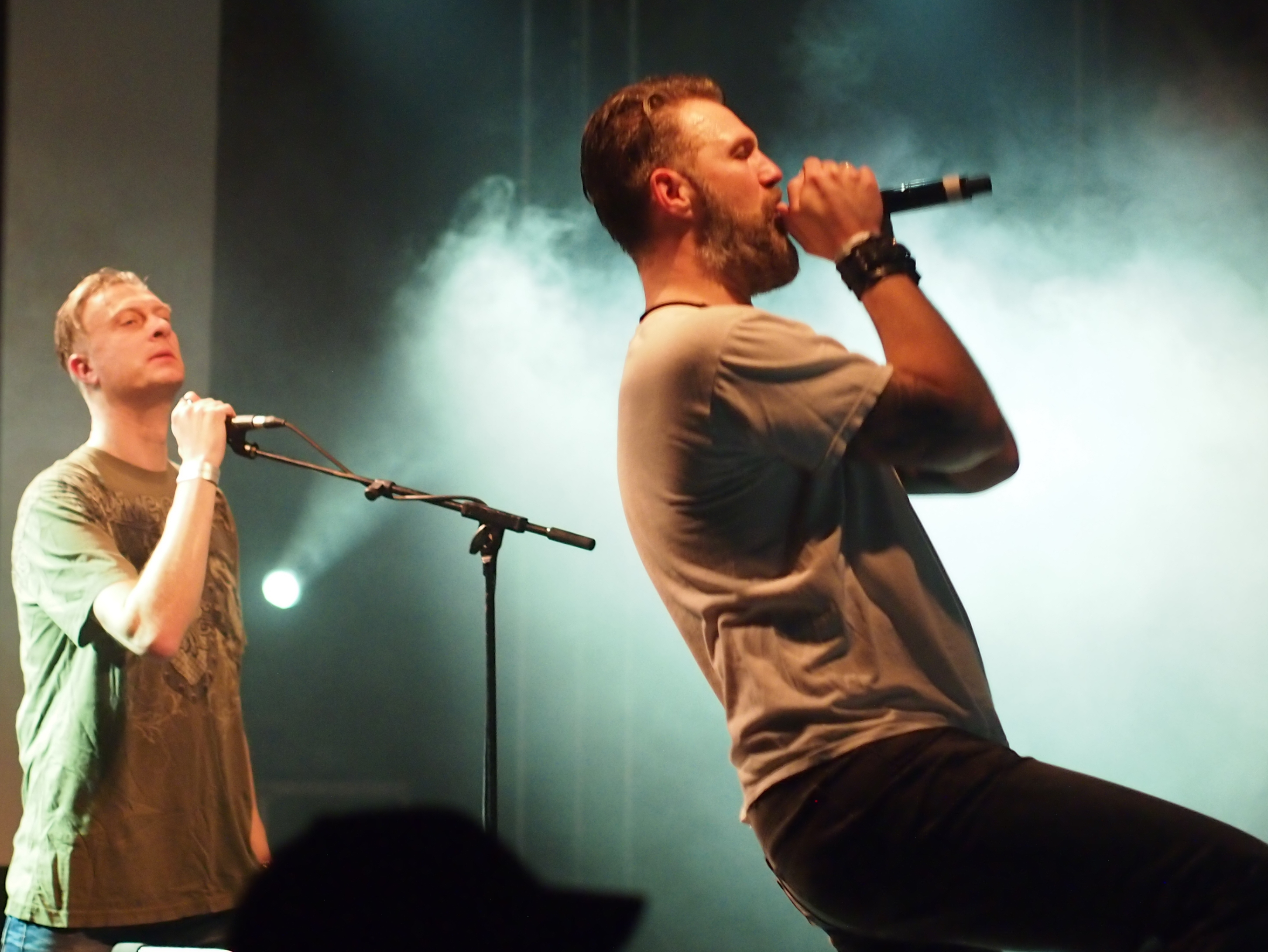 Pouppée Fabrikk auf dem E-Tropolis-Festival 2014 Festivalsommer This photo was created with the support of donations to Wikimedia Deutschland in the context of the CPB project "Festival Summer". This file is made available under the Creative Commons CC0 1.0 Universal Public Domain Dedication. The person who associated a work with this deed has dedicated the work to the public domain by waiving all of their rights to the work worldwide under copyright law, including all related and neighboring rights, to the extent allowed by law. You can copy, modify, distribute and perform the work, even for commercial purposes, all without asking permission. Thomas Springer Personality rights warningAlthough this work is freely licensed or in the public domain, the person(s) shown may have rights that legally restrict certain re-uses unless those depicted consent to such uses. In these cases, a model release or other evidence of consent could protect you from infringement claims.